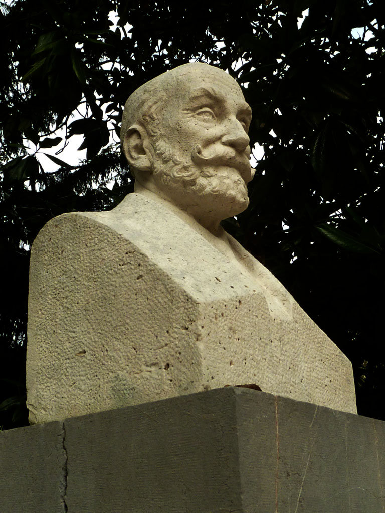 Escritor